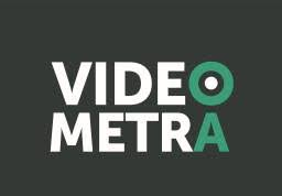 video metra logo